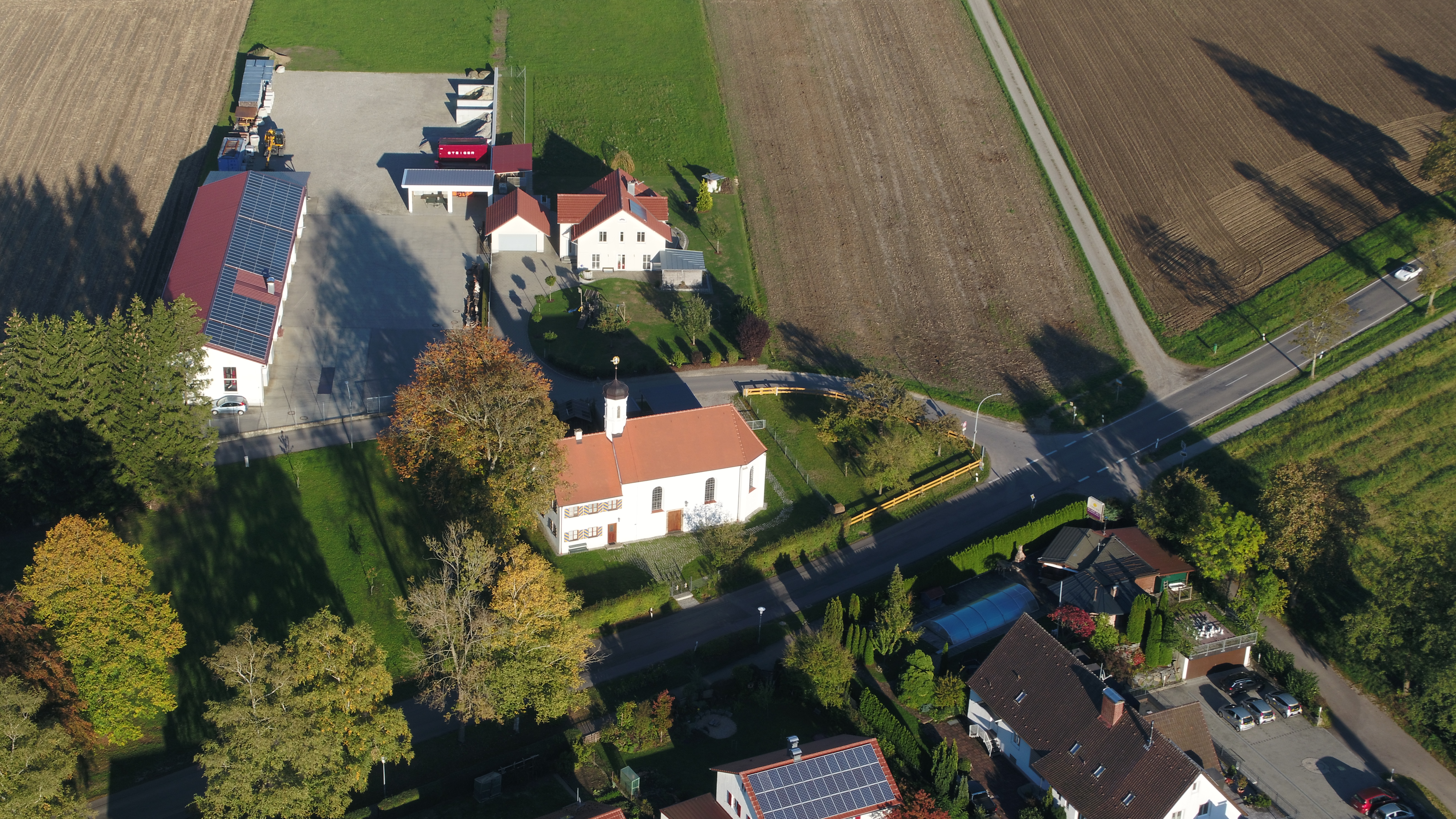 Kirchheim in Schwaben, Englisch Gruß Kapelle